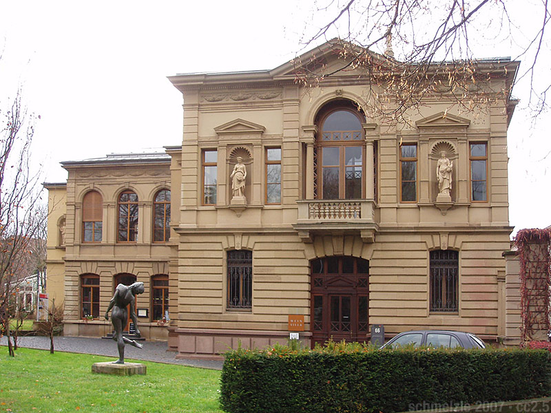 Villa Faißt in der Cäcilienstraße 66 in Heilbronn, heute „Wein Villa“ genannt.